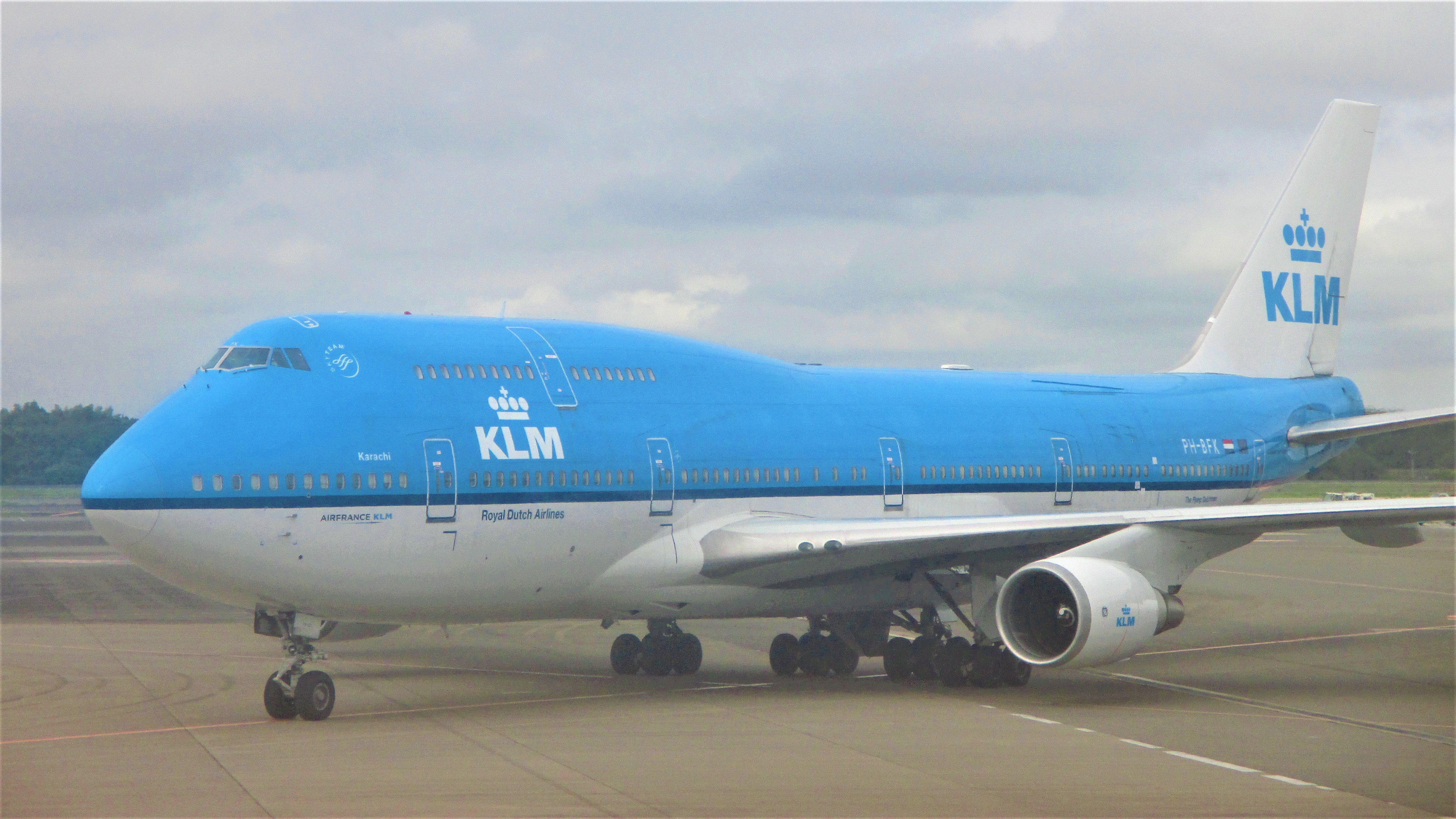 成田国際空港で撮影。